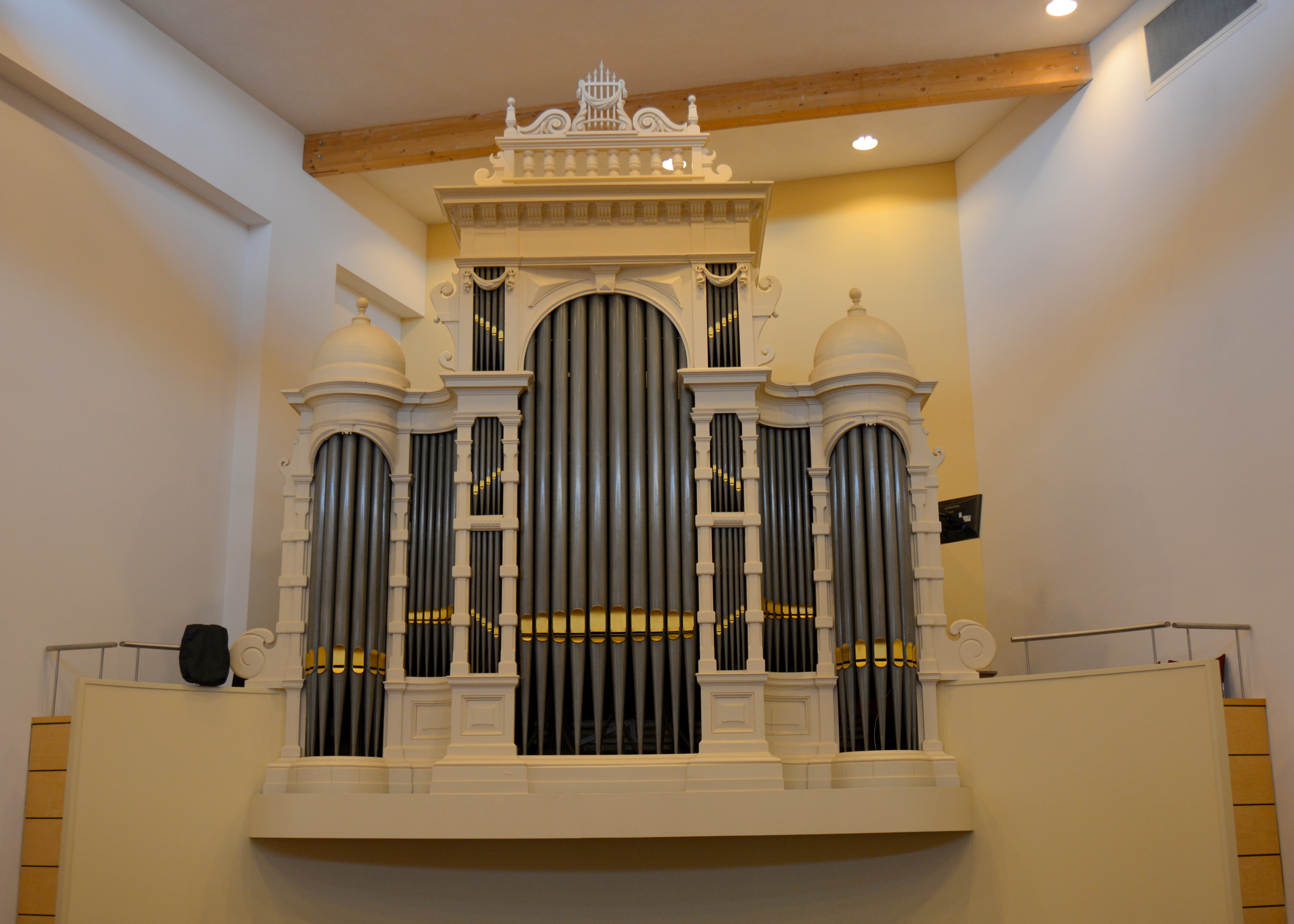 Orgel gereformeerd-vrijgemaakte kerk De Morgenster, Leeuwarden.